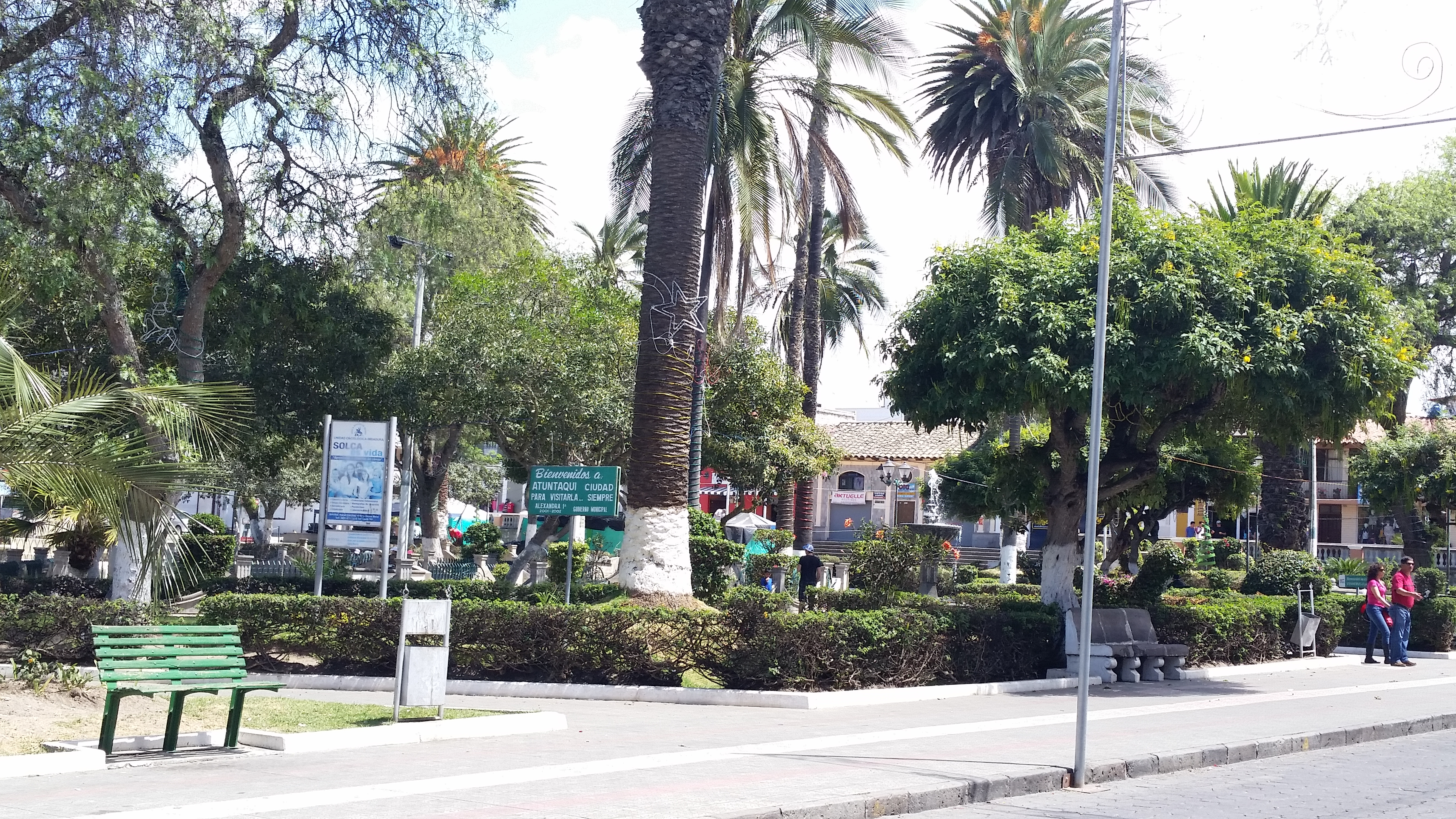 Parque Central "Antonio José de Sucre", Atuntaqui (Provincia de Imbabura)